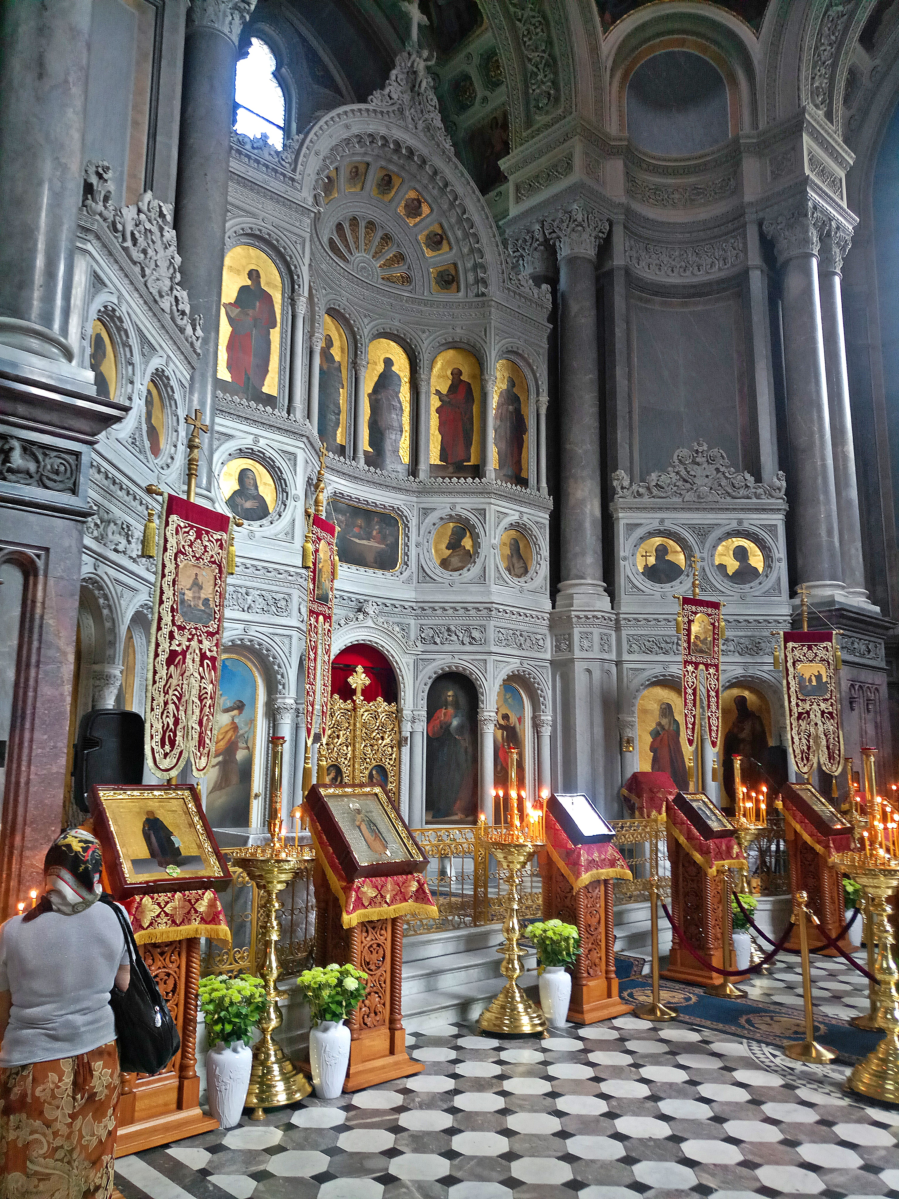 Russische Kirche Wiesbaden, innen, mit Ikonastase